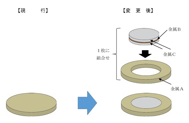 新しい五百円貨幣に採用する主な偽造防止技術。バイカラー・クラッド（二色三層構造）